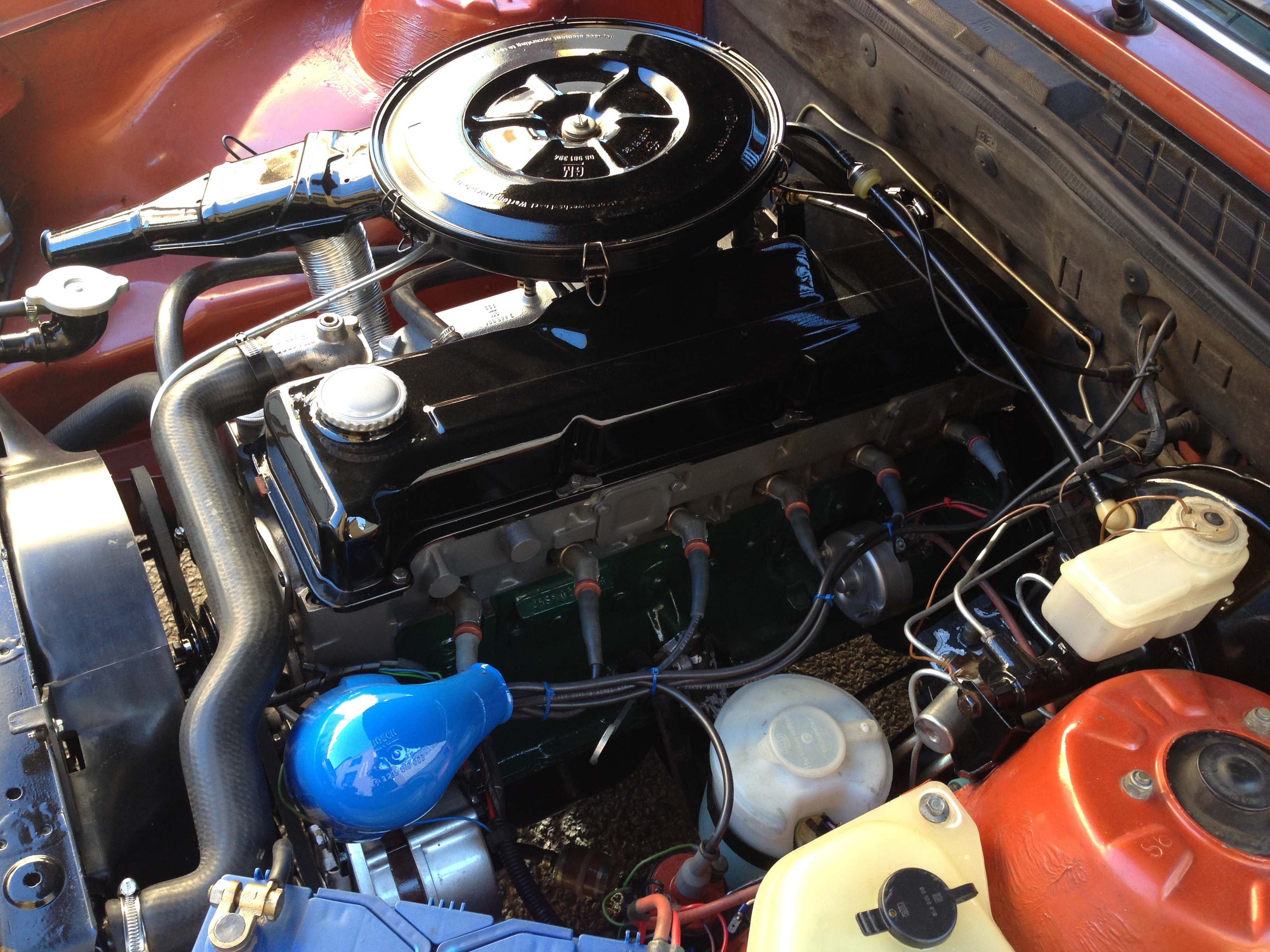 Moteur modèle 2.5 S carburateur 115 cv restauré